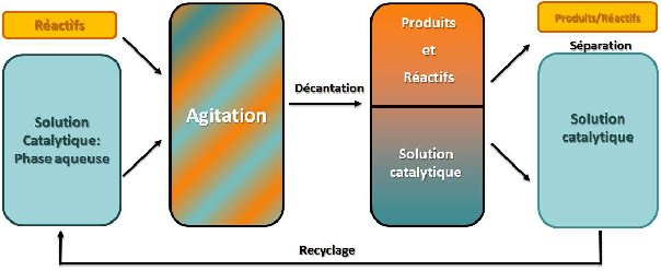 schéma de la catalyse dans l'eau